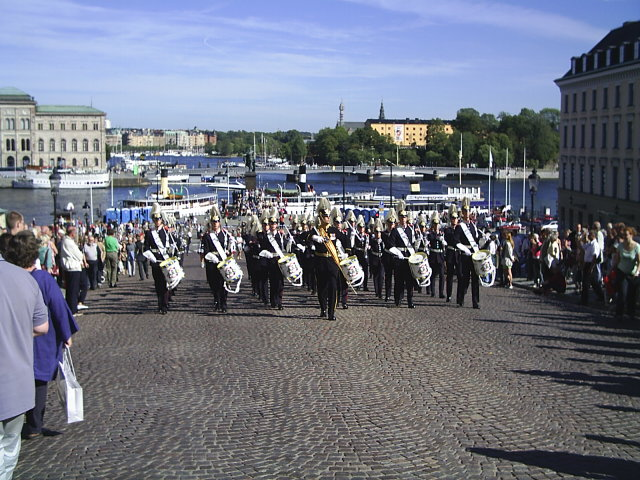 Arméns Musikkår på Slottsbacken i Stockholm. Fotograferad 11 sept. 2004.